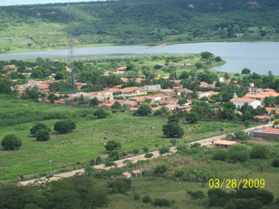 Cidade